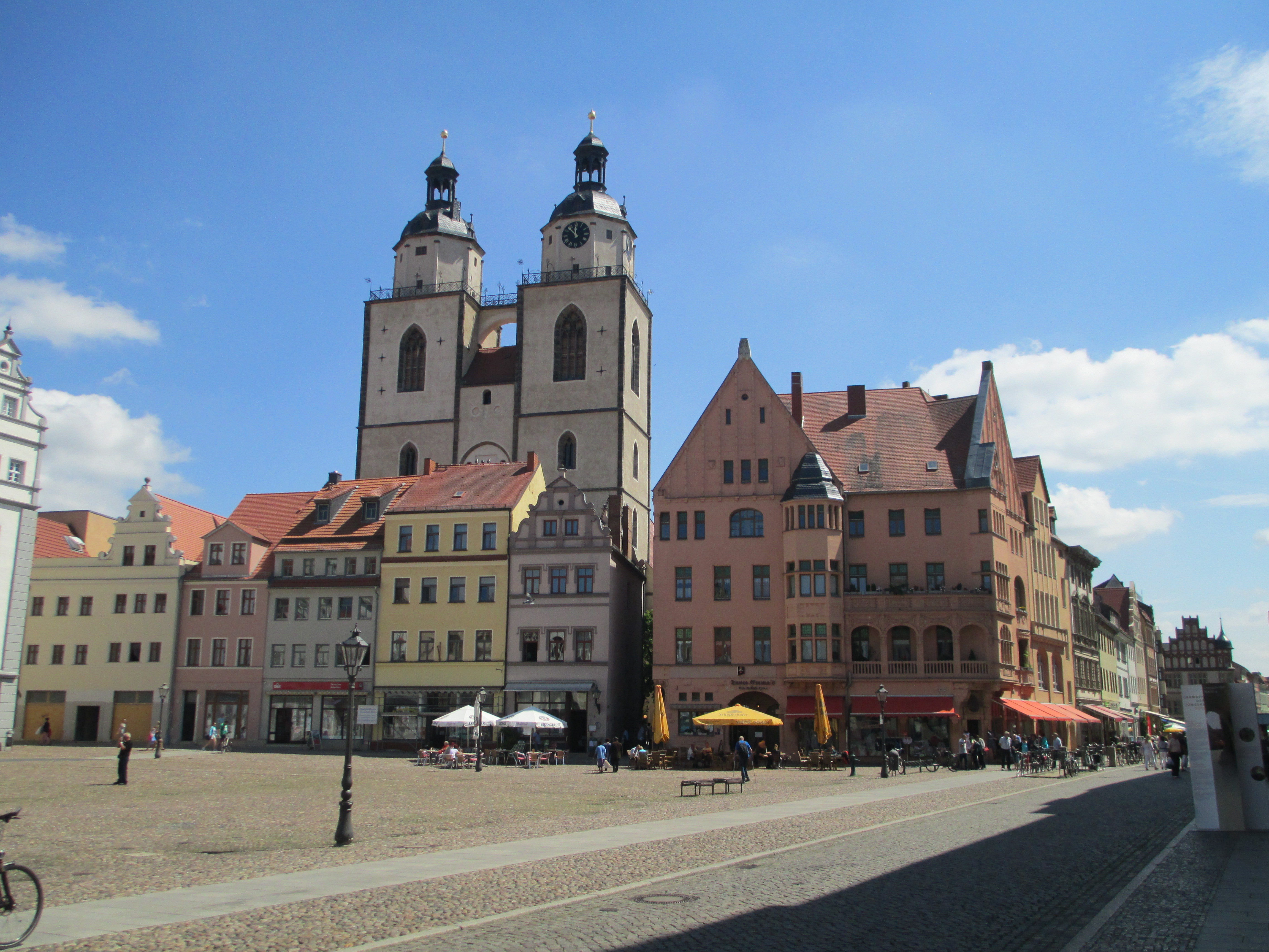 הכנסייה העירונית בוויטנברג